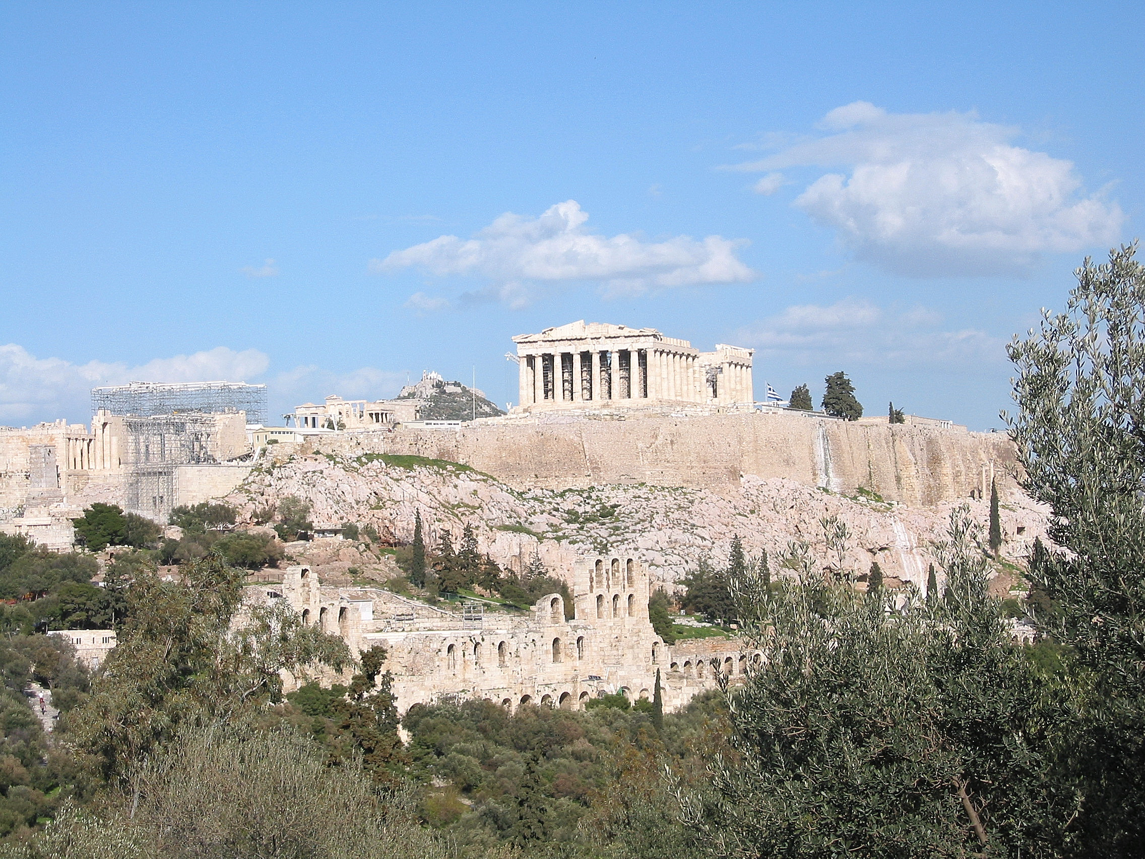 L'Acropole et le Parthénon. Prise de vue le 29/02/2004 par Harrieta171